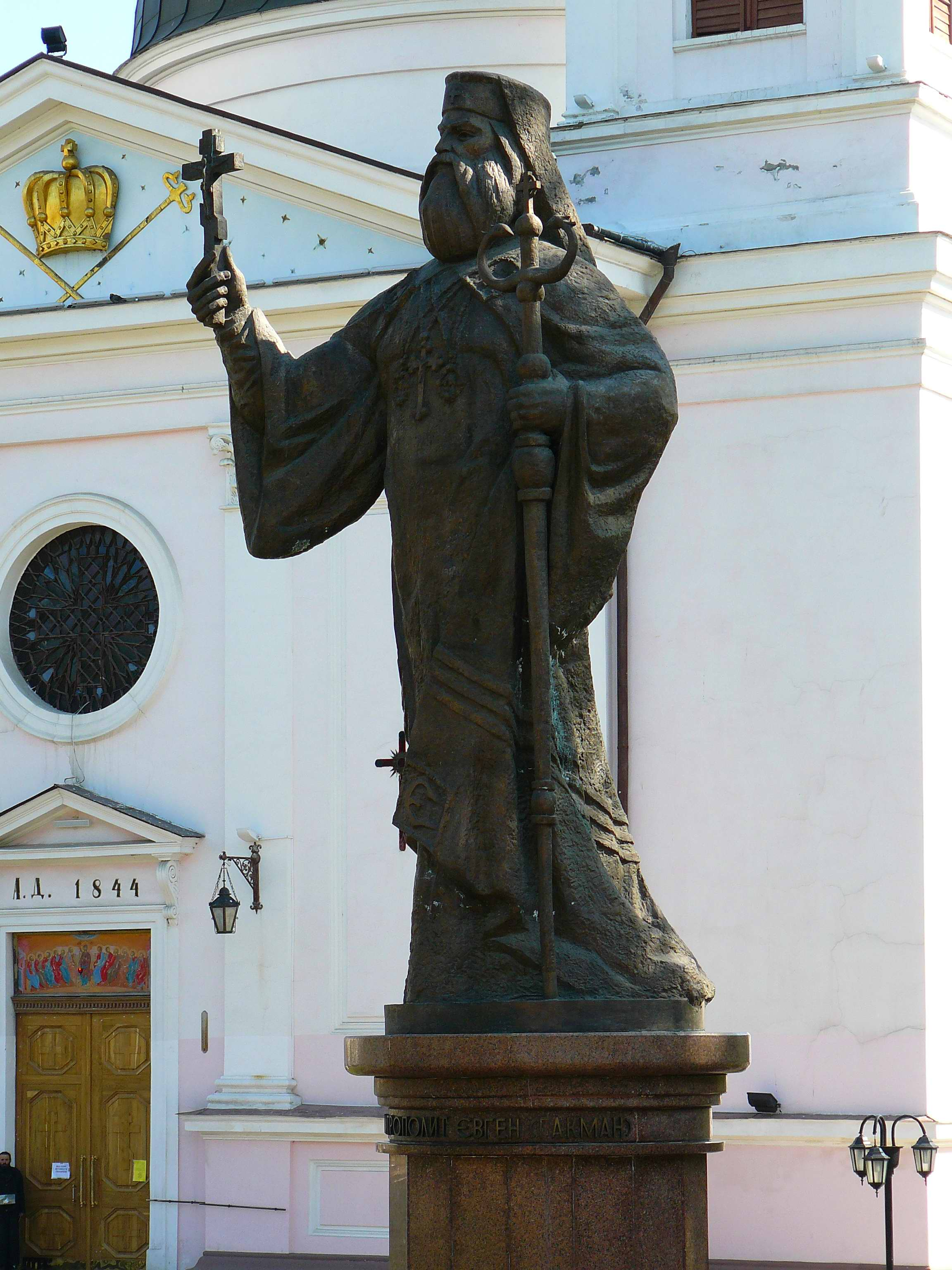 Кафедральний собор "Святого Духа" (арх. Рьолль, Й. Главка, інж. Марін), Чернівці, Головна, 85